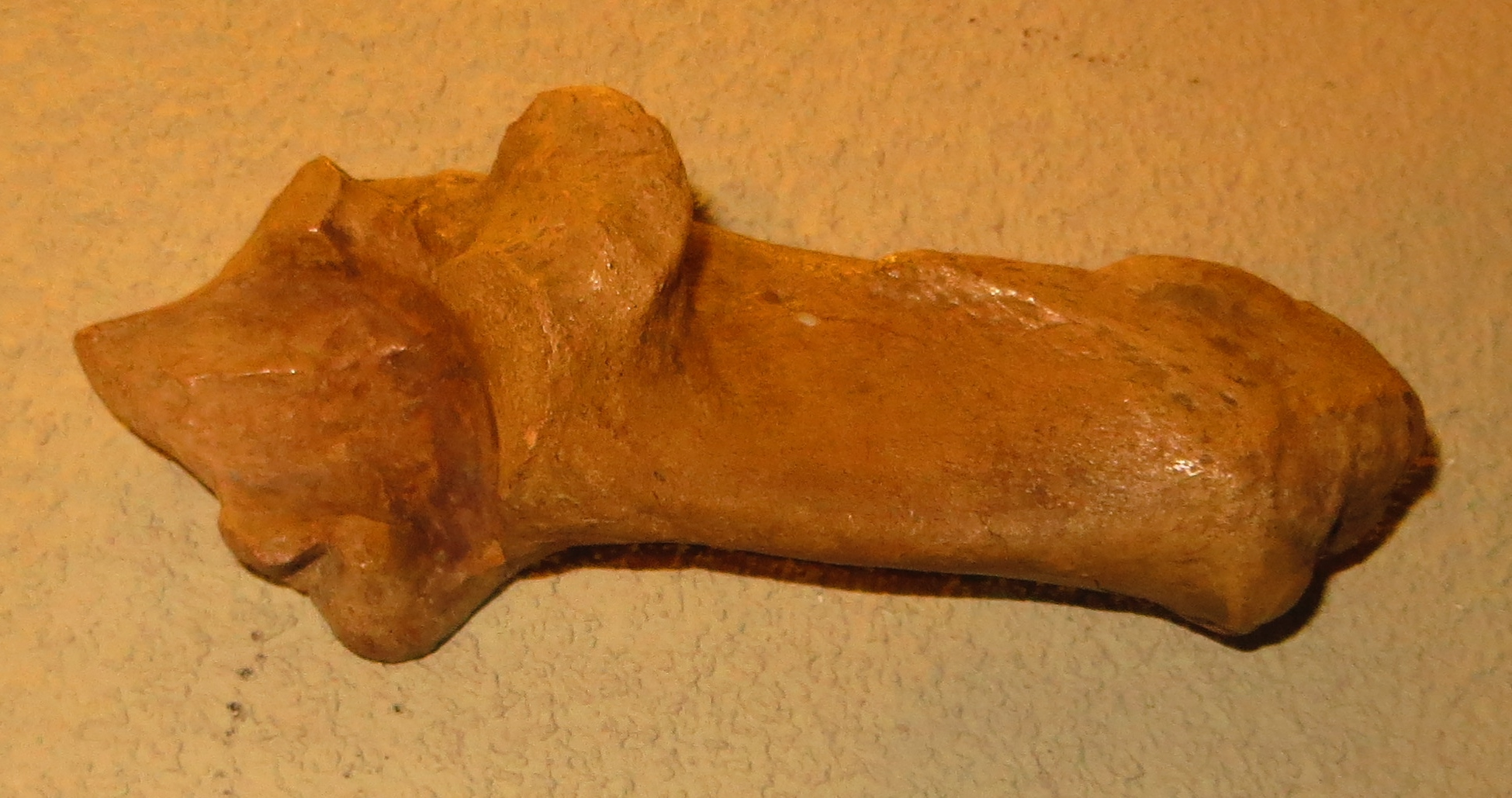 Fossil of Eucladoceros, an extinct mammal- Took the picture at Naturalis, Leiden